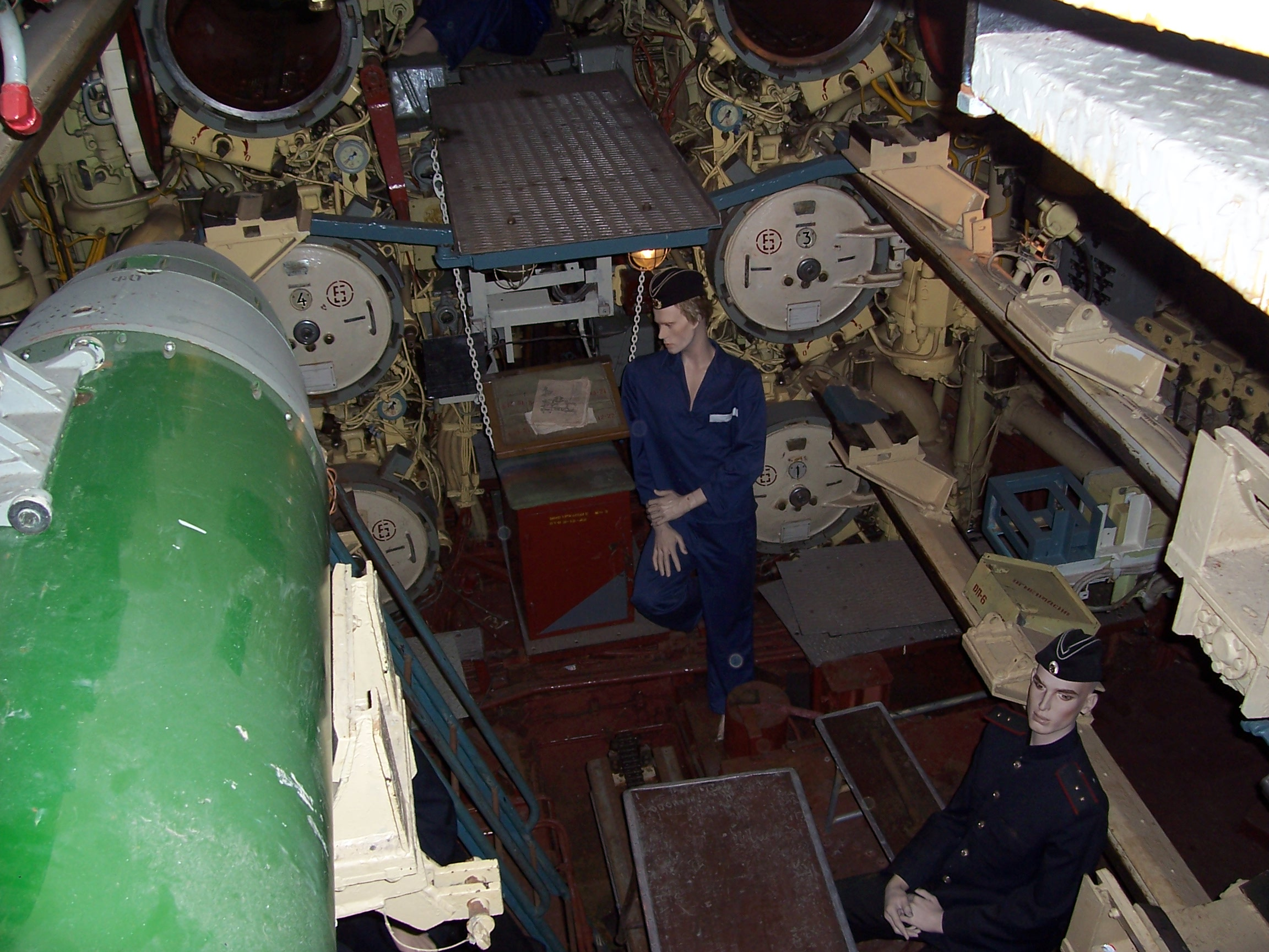 Torpedoraum der U434